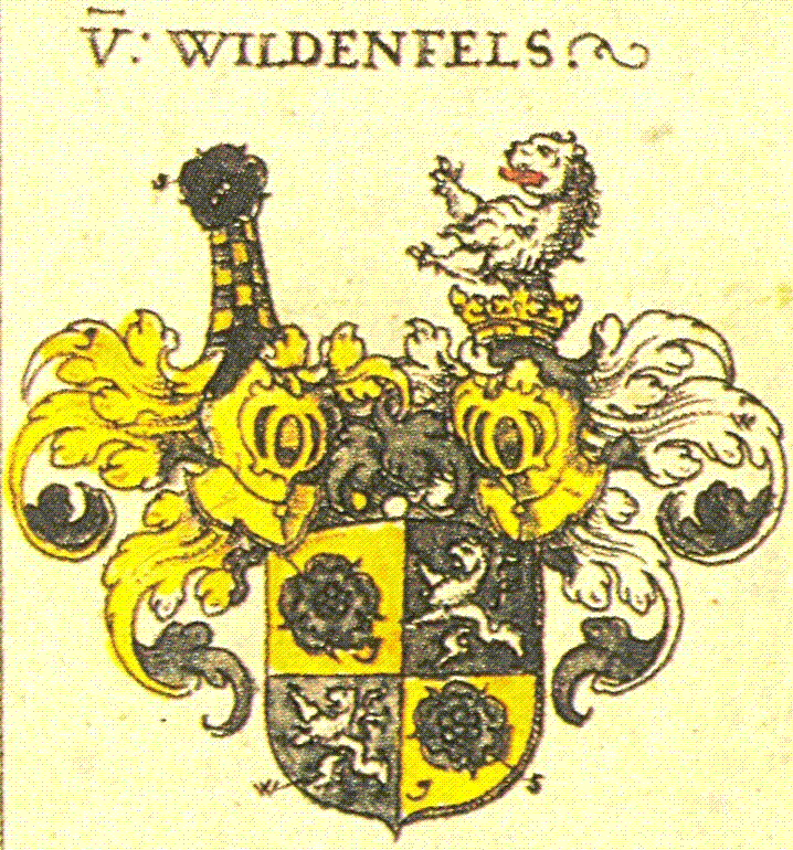 Wappen der Familie von Wildenfels aus Siebmachers Wappenbuch